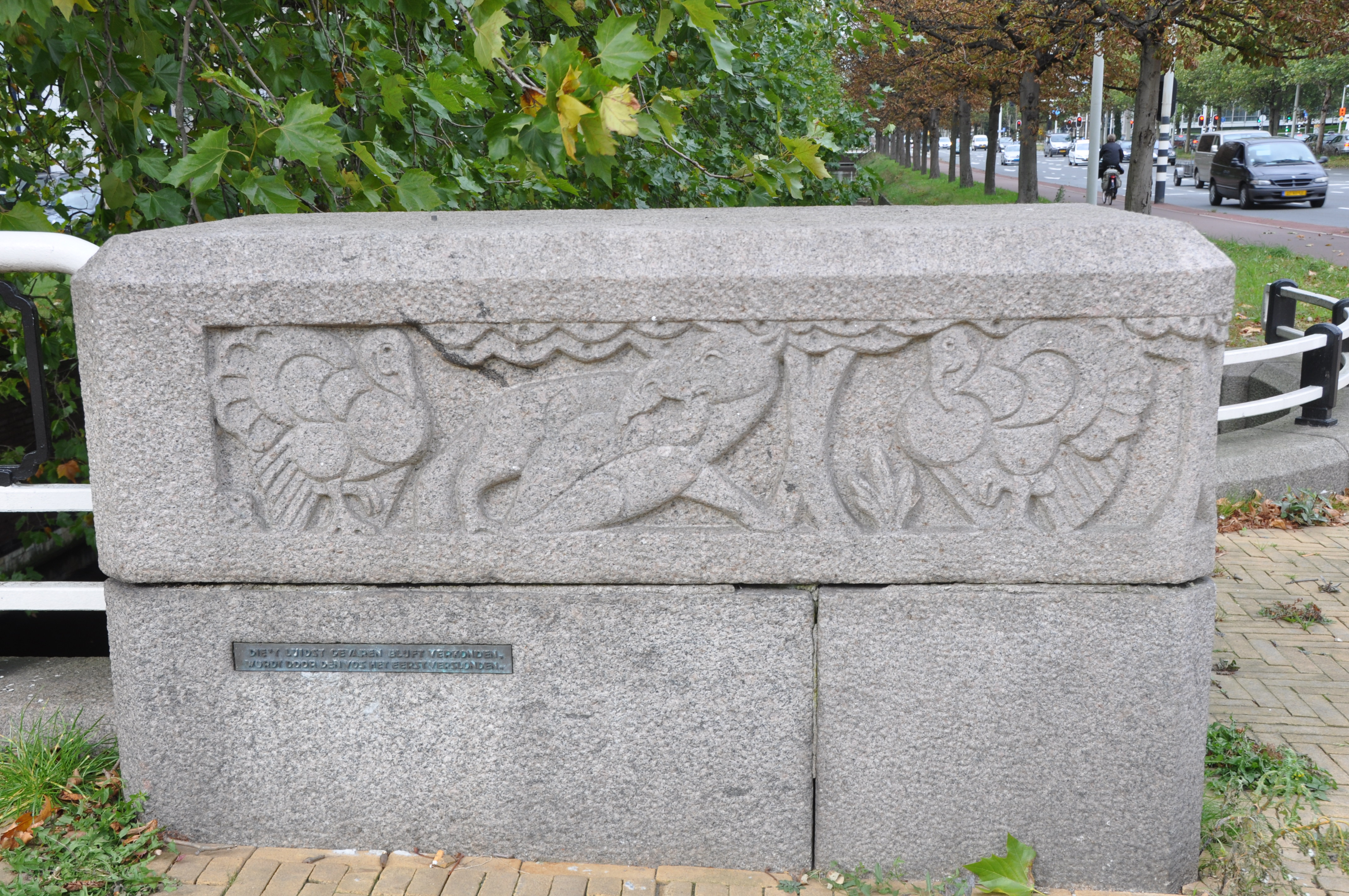 Bruggen in Den Haag.